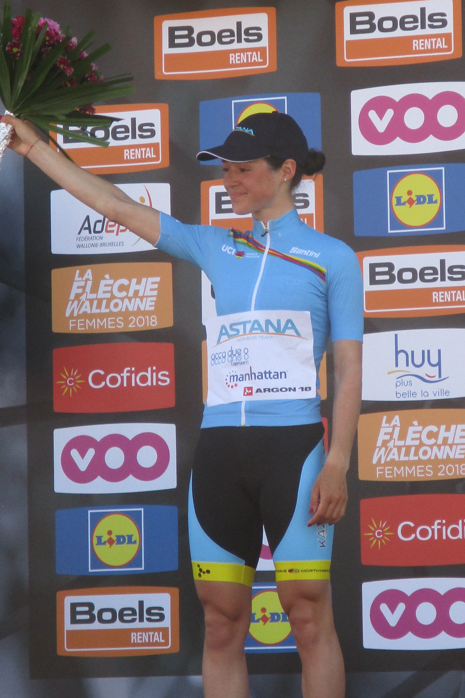 Waalse Pijl 2018 op de Mur van Huy. Beste jongere in Women's World Tour: Sofia Bertizzolo